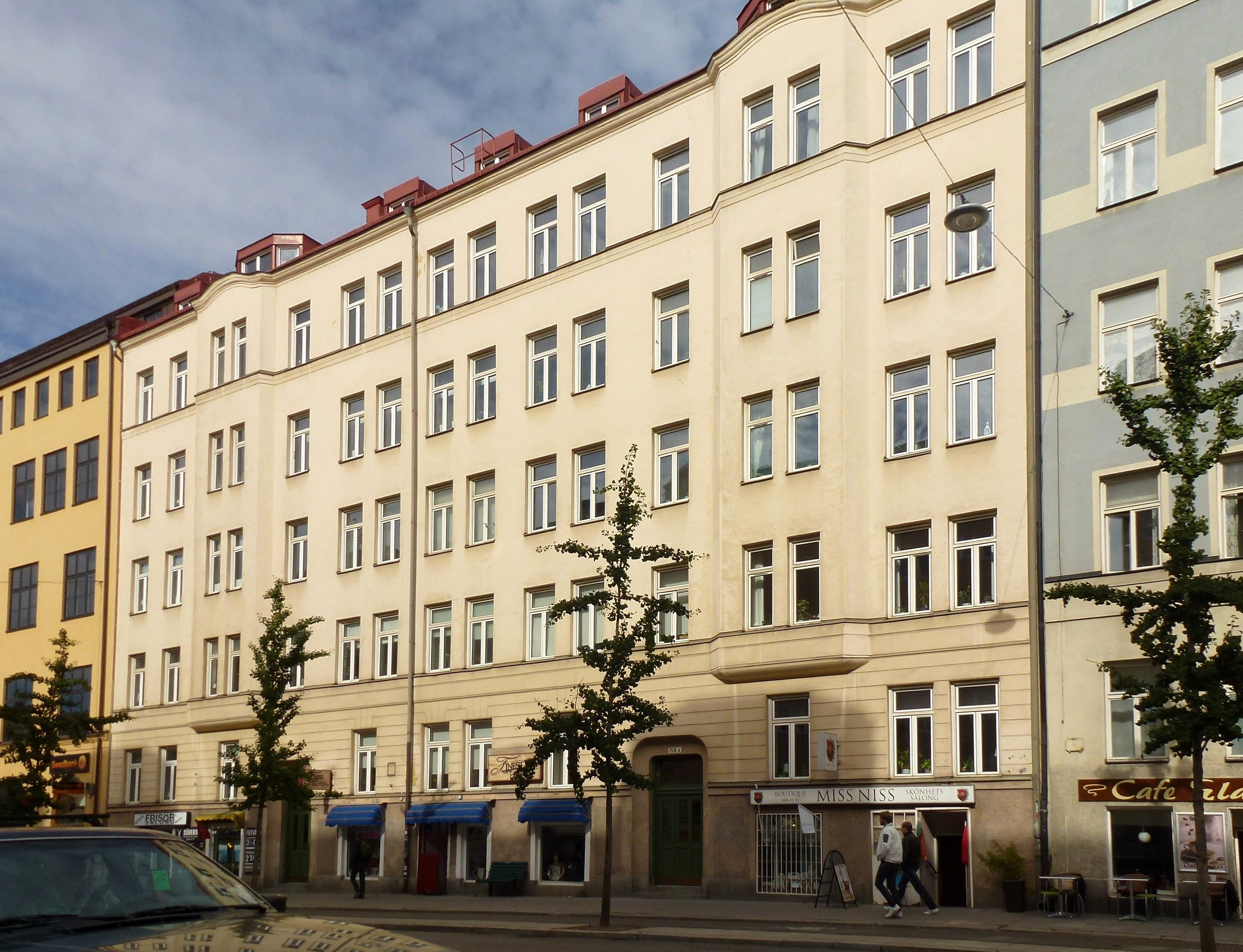 Hornsgatan 158